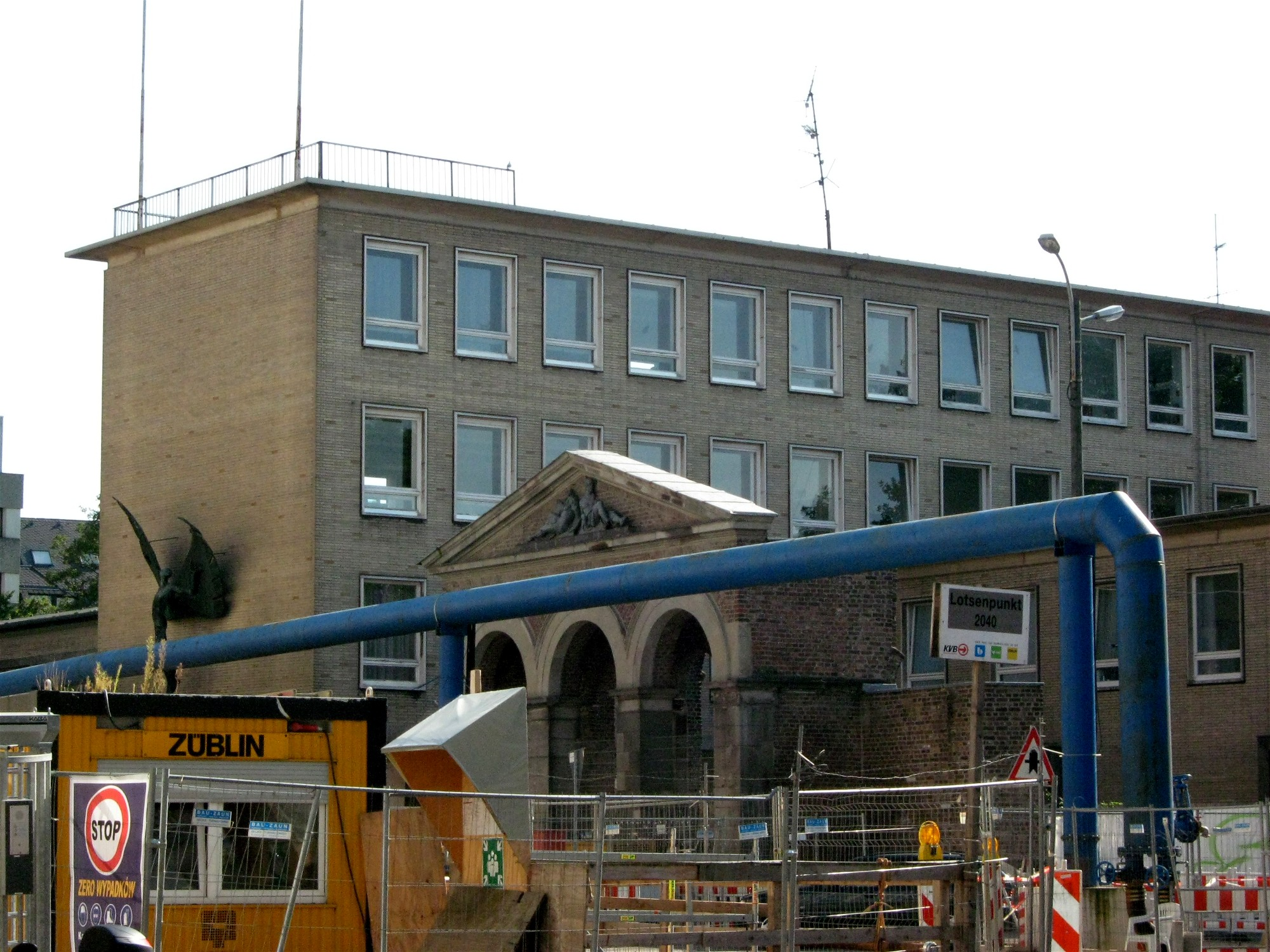 Friedrich-Wilhelm-Gymnasium in der Kölner Altstadt Süd an der Westseite der Severinsstraße. Davor Rohre der U-Bahn-Baustelle. Gegenüber stürzte ein halbes Jahr später auf der Ostseite das Stadtarchiv ein. Das Preussische Tor wurde bei dem Einsturz beschädigt und konnte inzwischen unter Aufsicht des Stadtkonservators geborgen werden. Der Portikus war Teil eines einstigen preussischen Wachgebäudes und entstand um 1840.